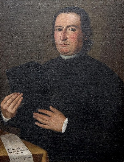 Ritratto di Paolo Antonio Fiorentini, olio su tavola, firmato e datato, Diocesi di Crema